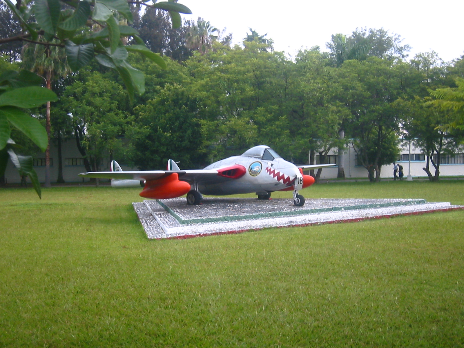 De Haviland Vampire en el Colegio del Aire